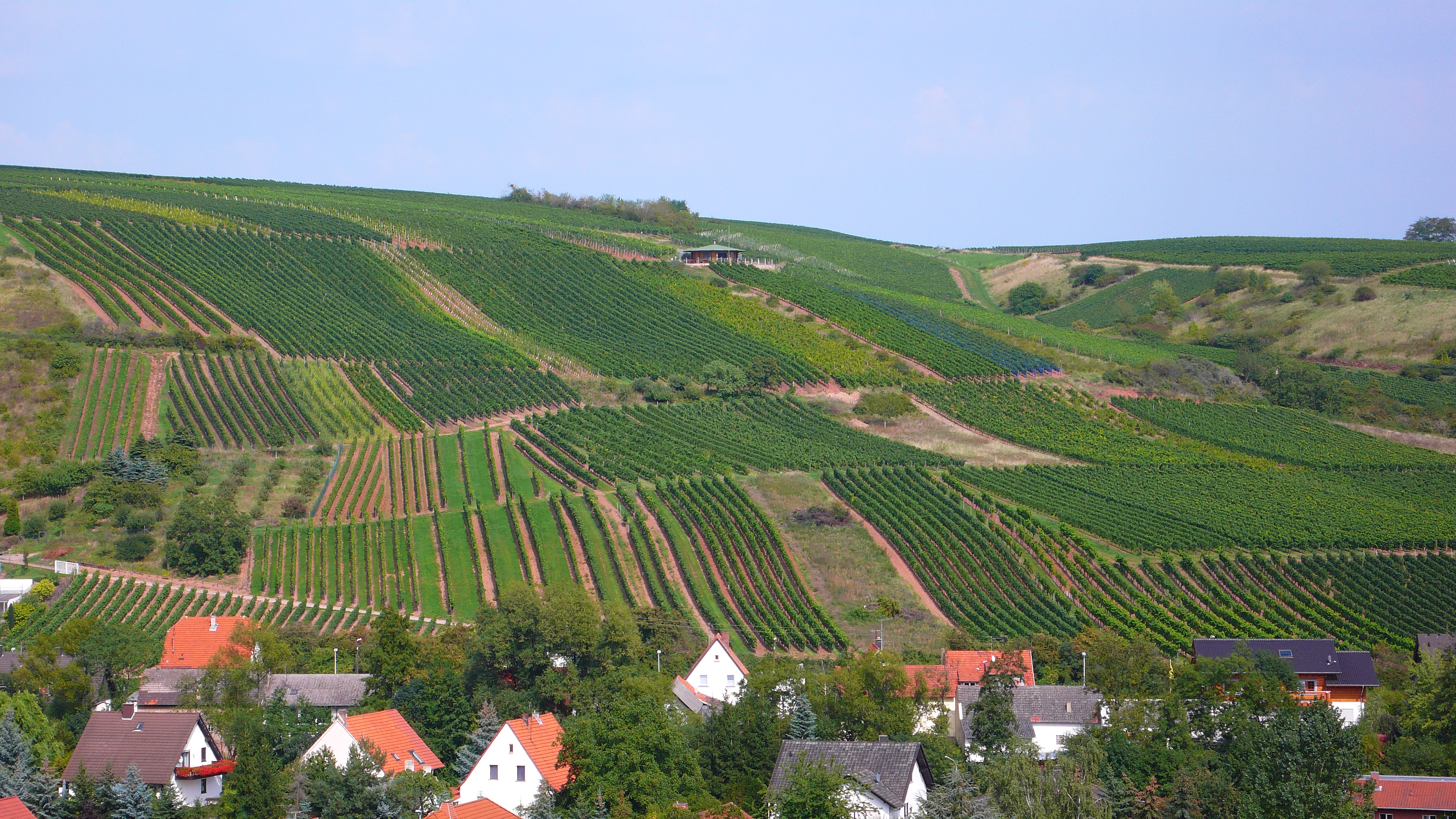 Guldentaler Sonnenberg mit SonnenbergHütte im Weinland Nahe